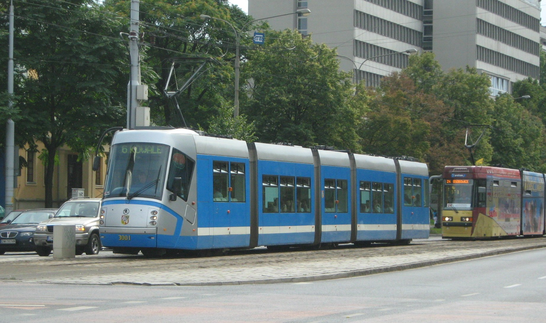 Tramwaj Škoda 16T na ul. Powstańców Śląskich we Wrocławiu. Za nim Protram 205WrAs.